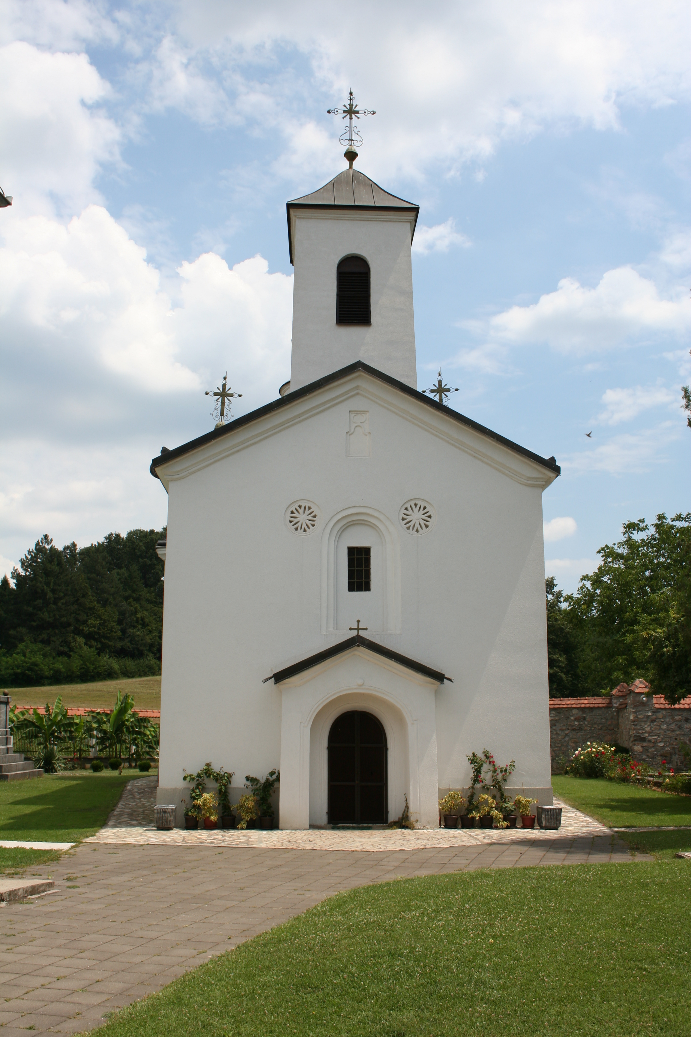 Manastir Čokešina